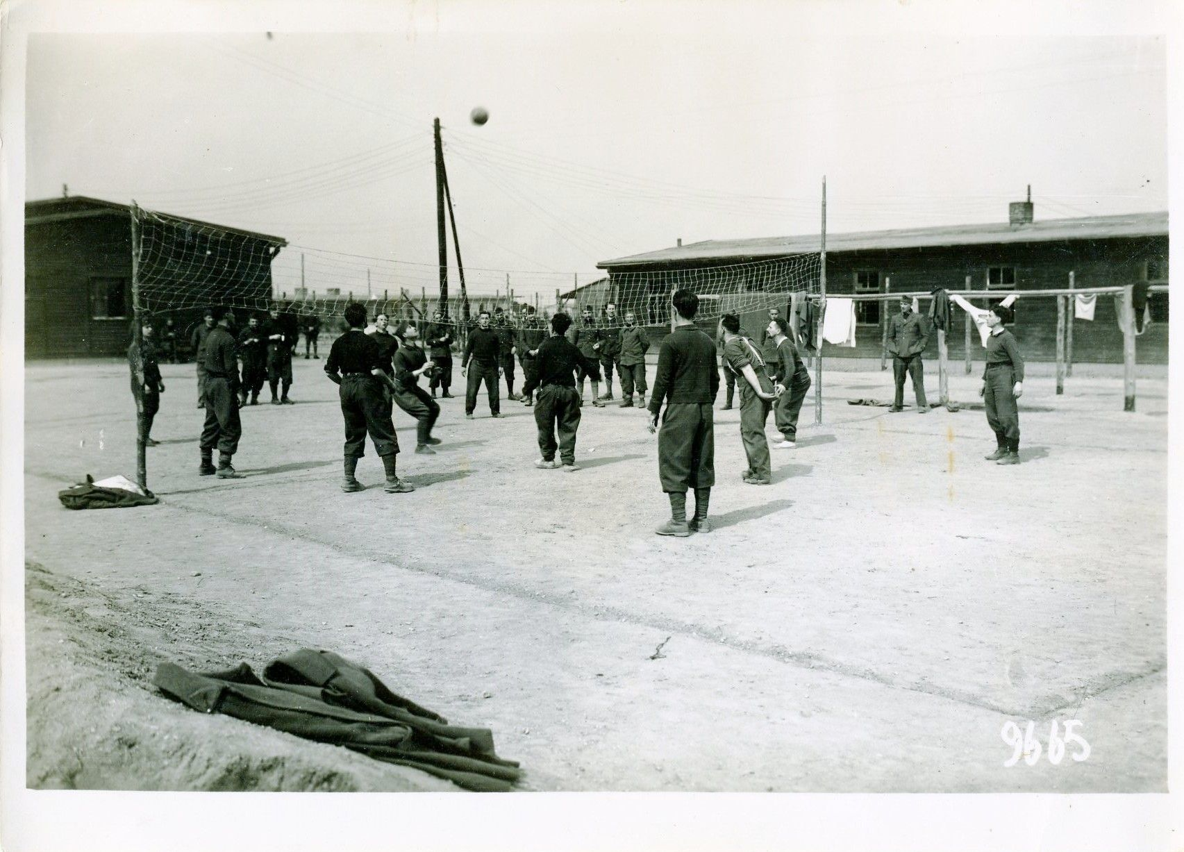 Foto van sportactiviteiten in het krijgsgevangenkamp Muhlberg an der Elbe, of Stalag IV-B. Deze foto is gemaakt door een van de kampfotografen, waaronder Dhr. J.H. Adam. Stalag IV-B was een van de grootste krijgsgevangenkampen in Duitsland ten tijde van de Tweede Wereldoorlog. Hier werden krijgsgevangenen van ruim dertig nationaliteiten vastgehouden, waaronder Nederlanders.